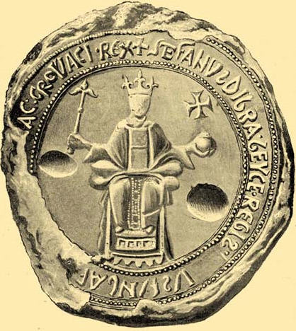 Štěpán II.